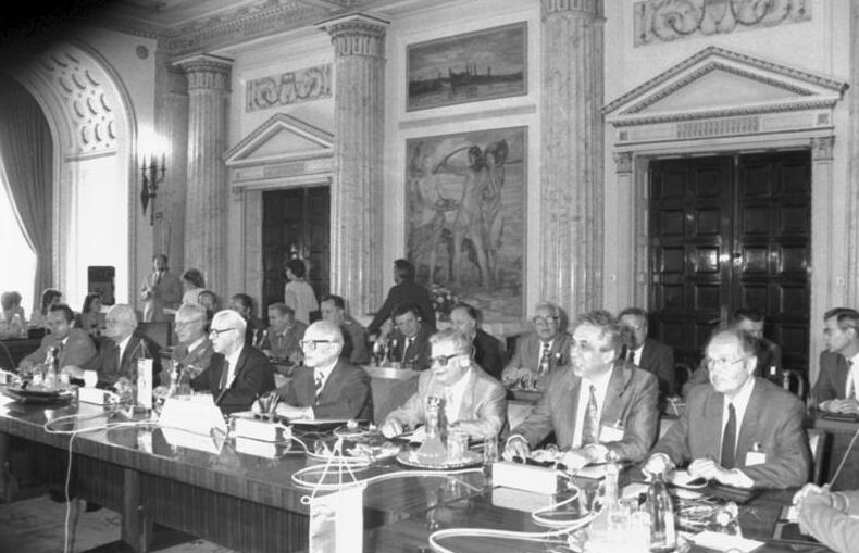 ADN-ZB / Mittelstädt / 7.7.89 / SRR: Beratung des Politischen Beratenden Ausschusses Der Politische Beratende Ausschuß der Teilnehmerstaaten des Warschauer Vertrages über Freundschaft, Zusammenarbeit und gegenseitigen Beistand ist zu seiner zweitägigen Tagung in Bukarest zusammengetreten. DDR-Delegation v.r.: Oskar Fischer, Egon Krenz, Hermann Axen, Erich Honecker, Willi Stoph, Heinz Keßler und Günter Mittag.